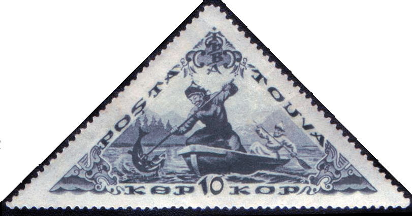 Почтовая марка Тувинской Народной Республики, 1941. Ловля рыбы острогой